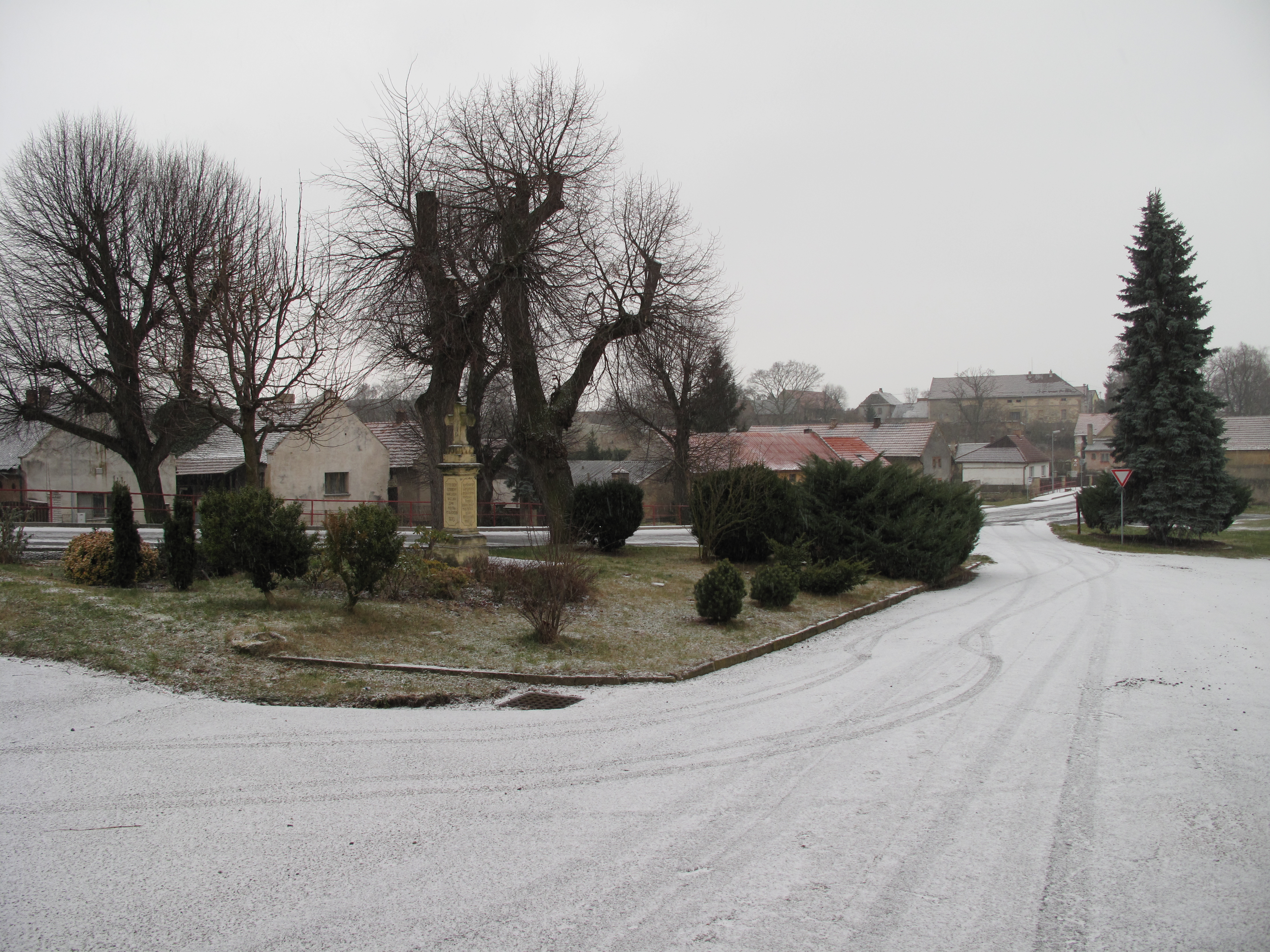 Náves v Páleči. Okres Kladno, Česká republika.